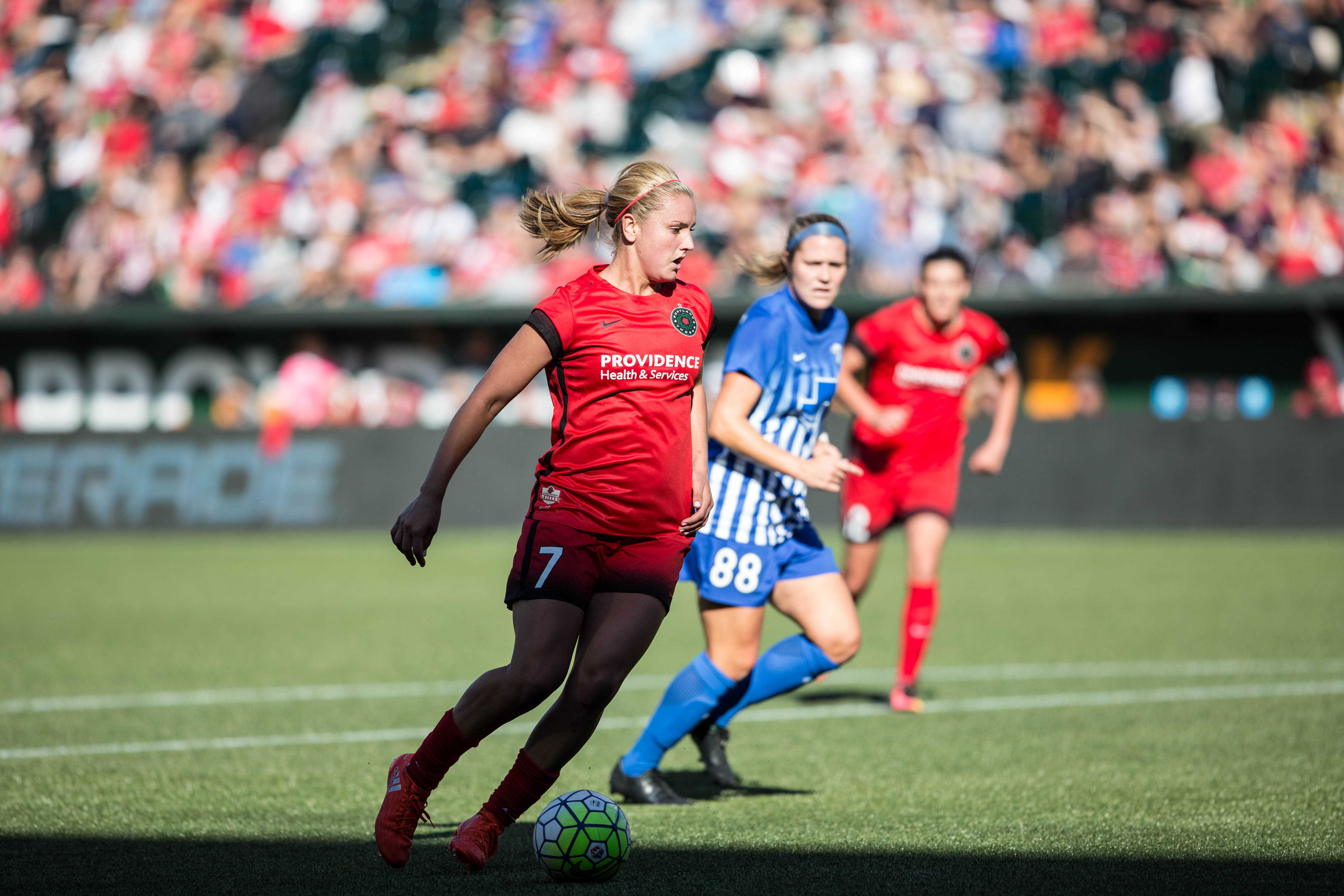 N42A2890.jpg